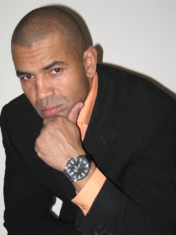 Robert Býček